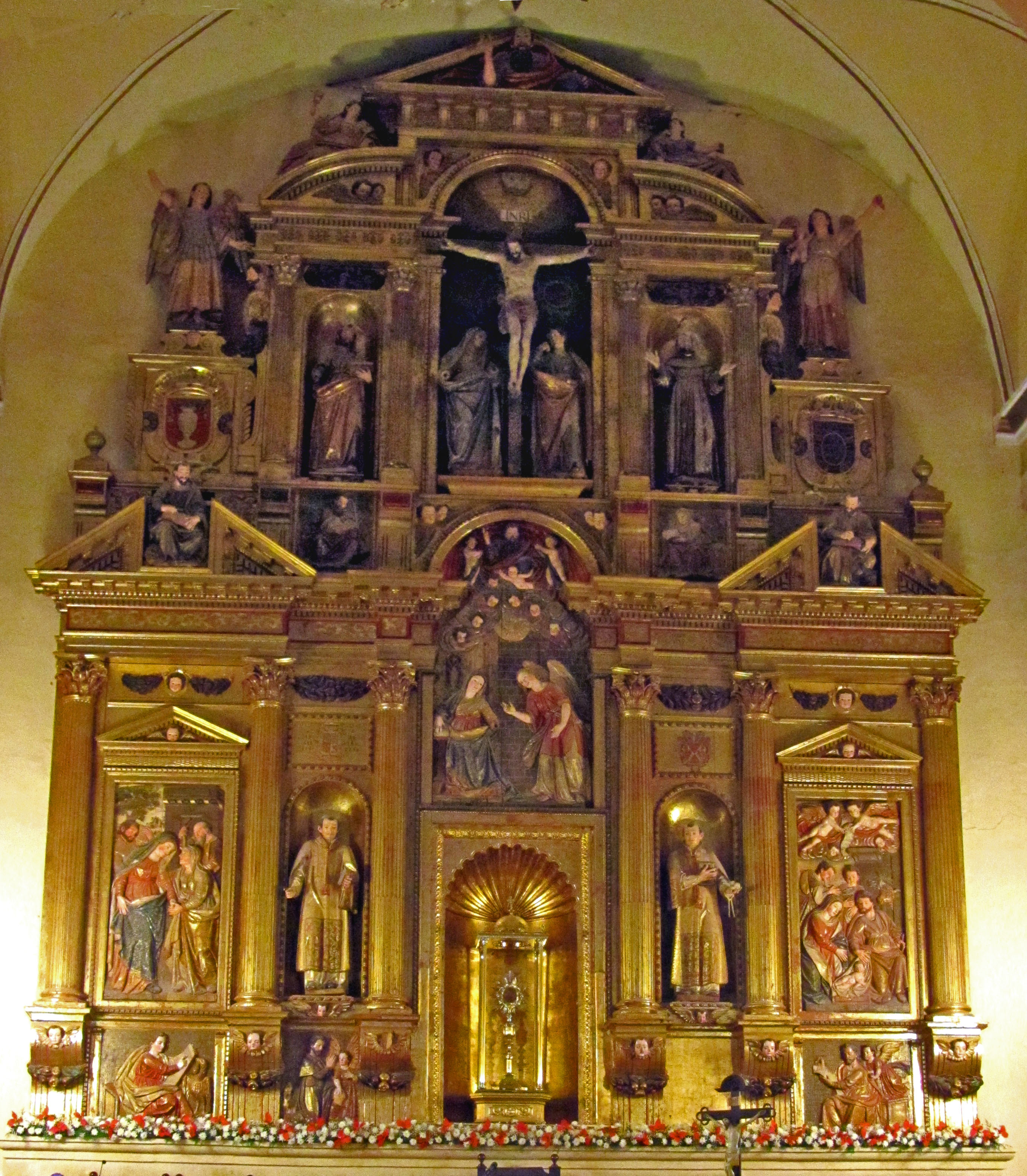 Retablo de la Iglesia de Cambil, (Jaén) realizado por Sebastián de Solís en el siglo XVII